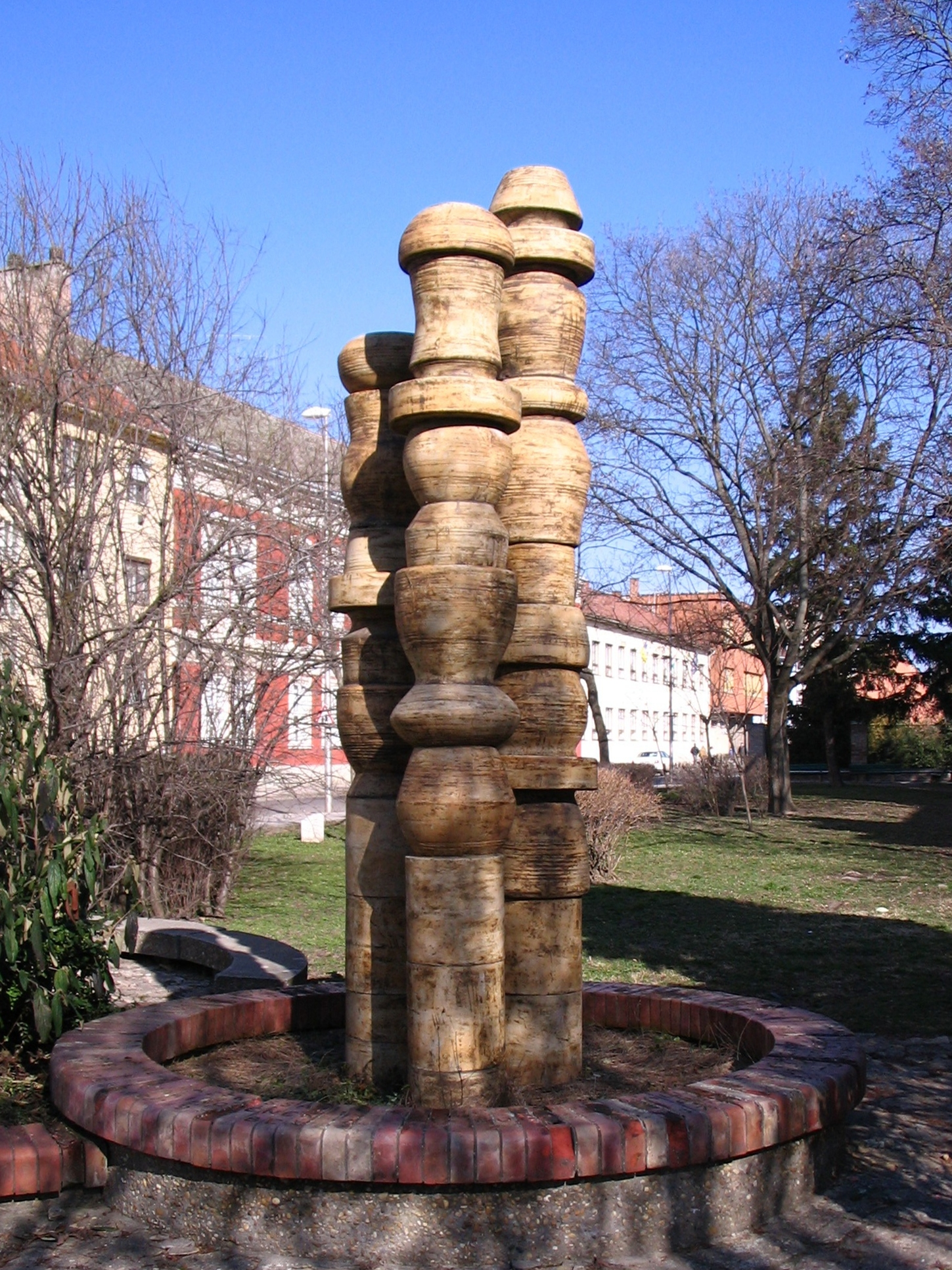 Majolikagyári emlékmű (Avagy: Jubileumi díszkút), Probstner János, Borvendég Béla János (tervező), 1972, pirogránit/kerámia, absztrakt, évfordulós (a Majolikagyár fennállásának 60. évfordulójára), emlékmű. - Hódmezővásárhely, Andrássy út és Szent Antal utca sarok